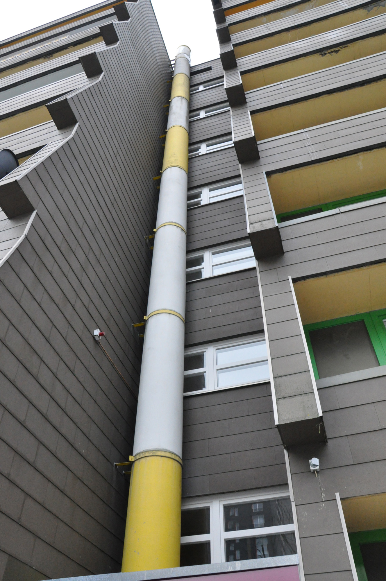 Außenrohre der Müllsauganlage, Abfallsauganlage, Müllschlucker am Mombertplatz in Heidelberg/Emmertsgrund